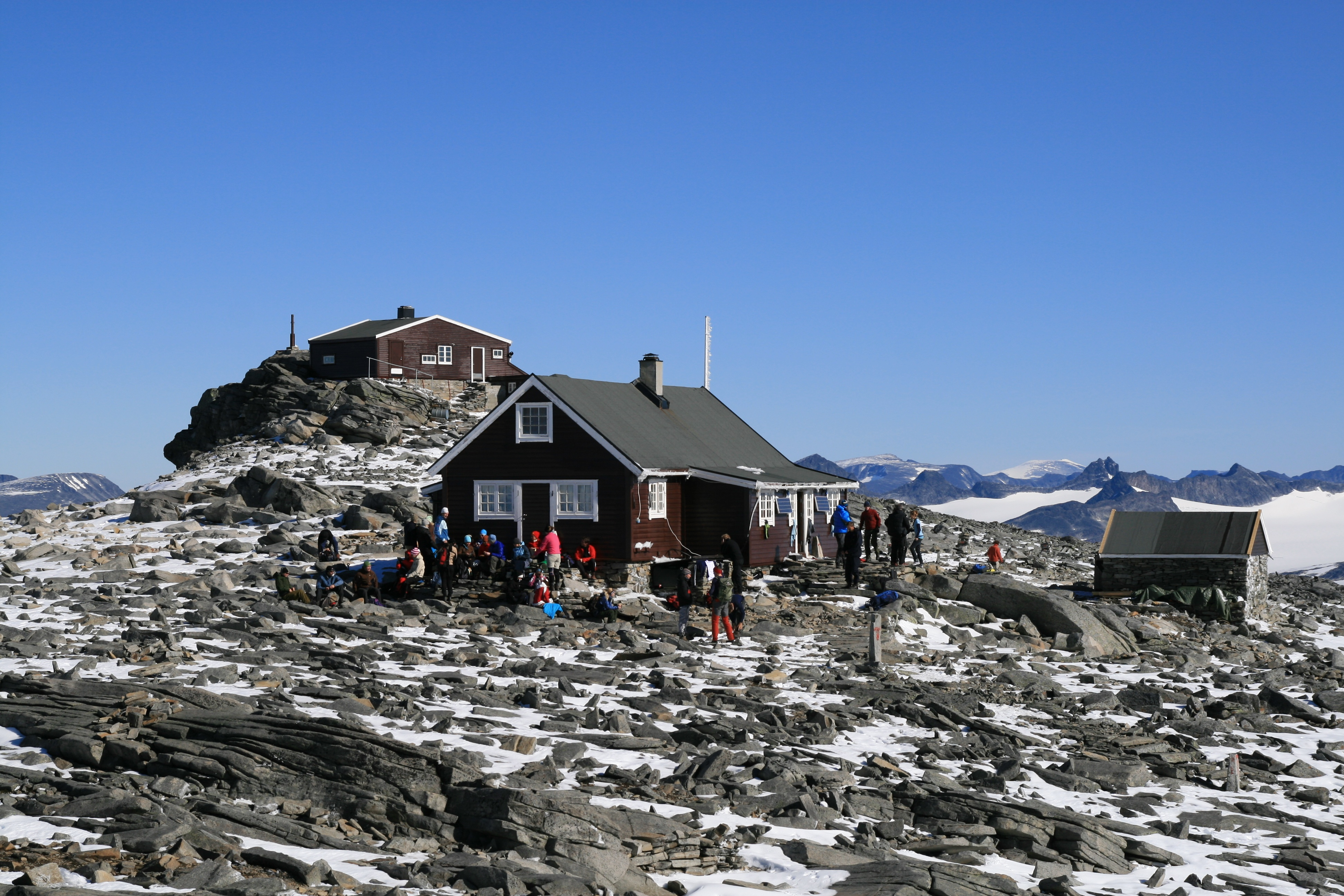 Fannaråkhytta (2065 moh.) på toppen av Fannaråki, er Norges høyestliggende DNT-hytte. Hytta er betjent i sommersesongen fra slutten av juni til medio september, utenom sesong er hytten stengt.